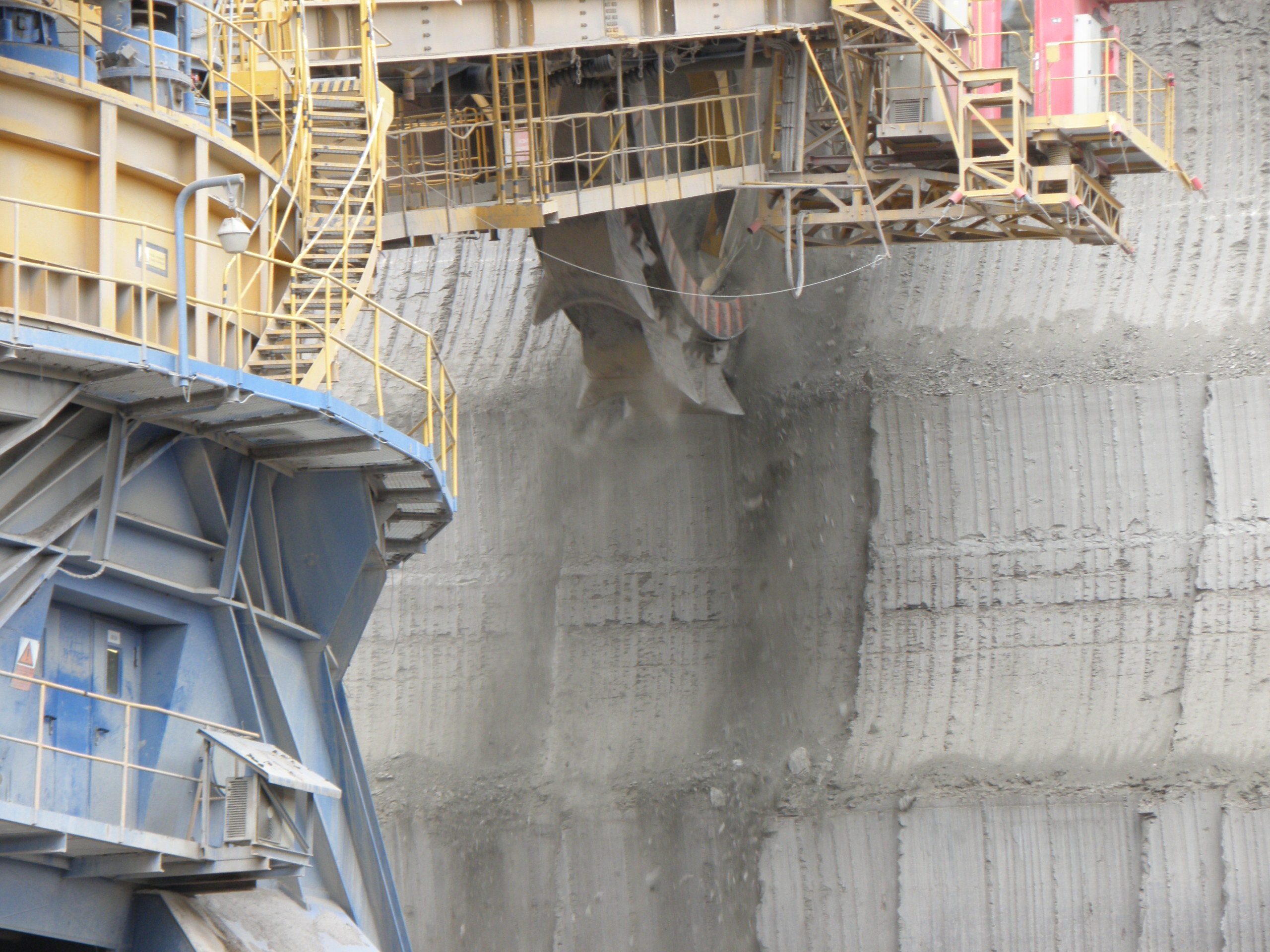 Koleso ve skrývce, 2009.